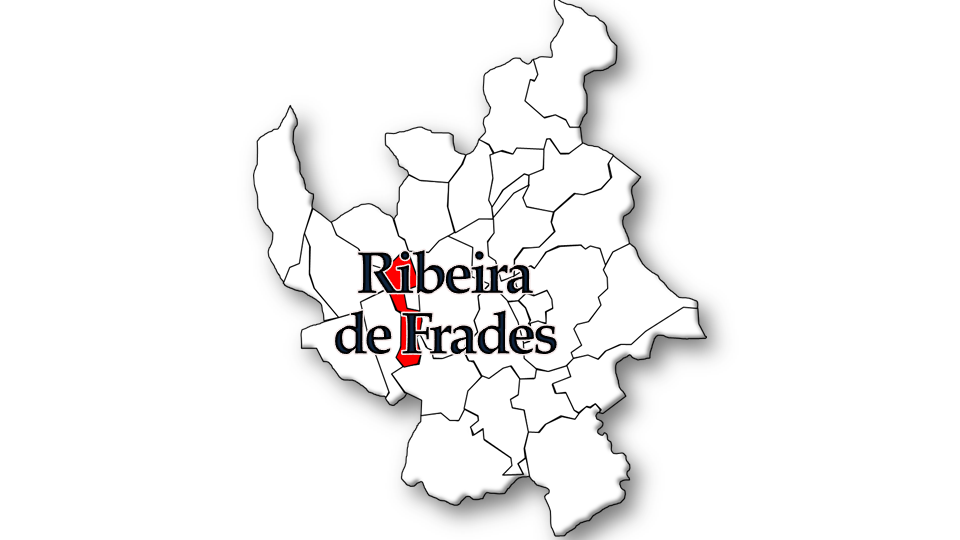 População